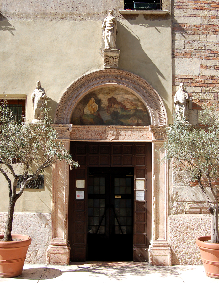 Chiesa di San Giovanni in Foro a Verona